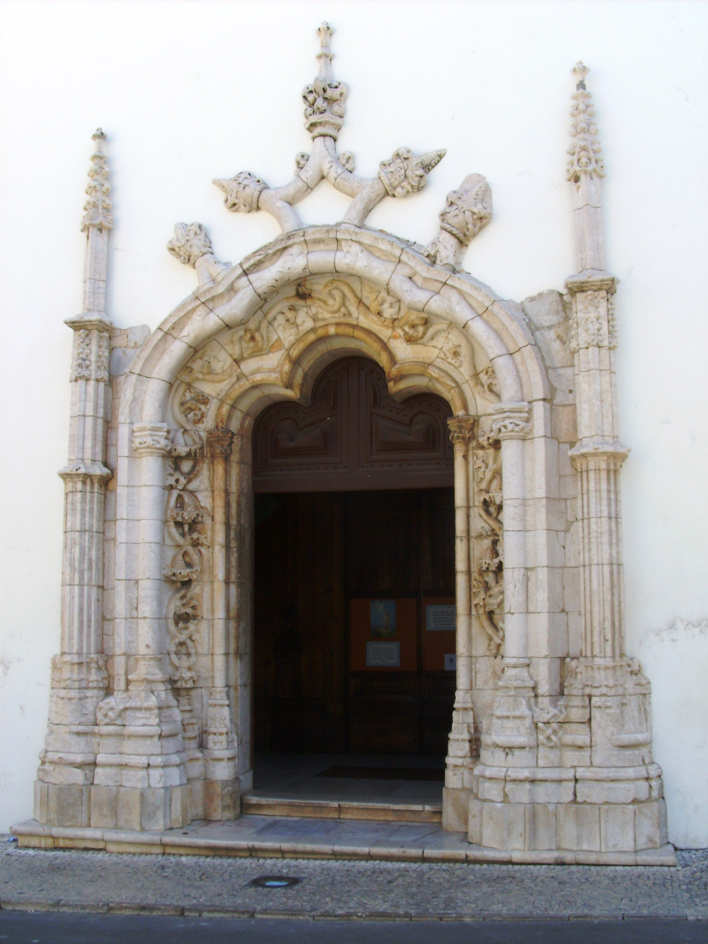 Igreja de Santa Maria de Marvila, cidade e distrito de Santarém, Portugal: portada.